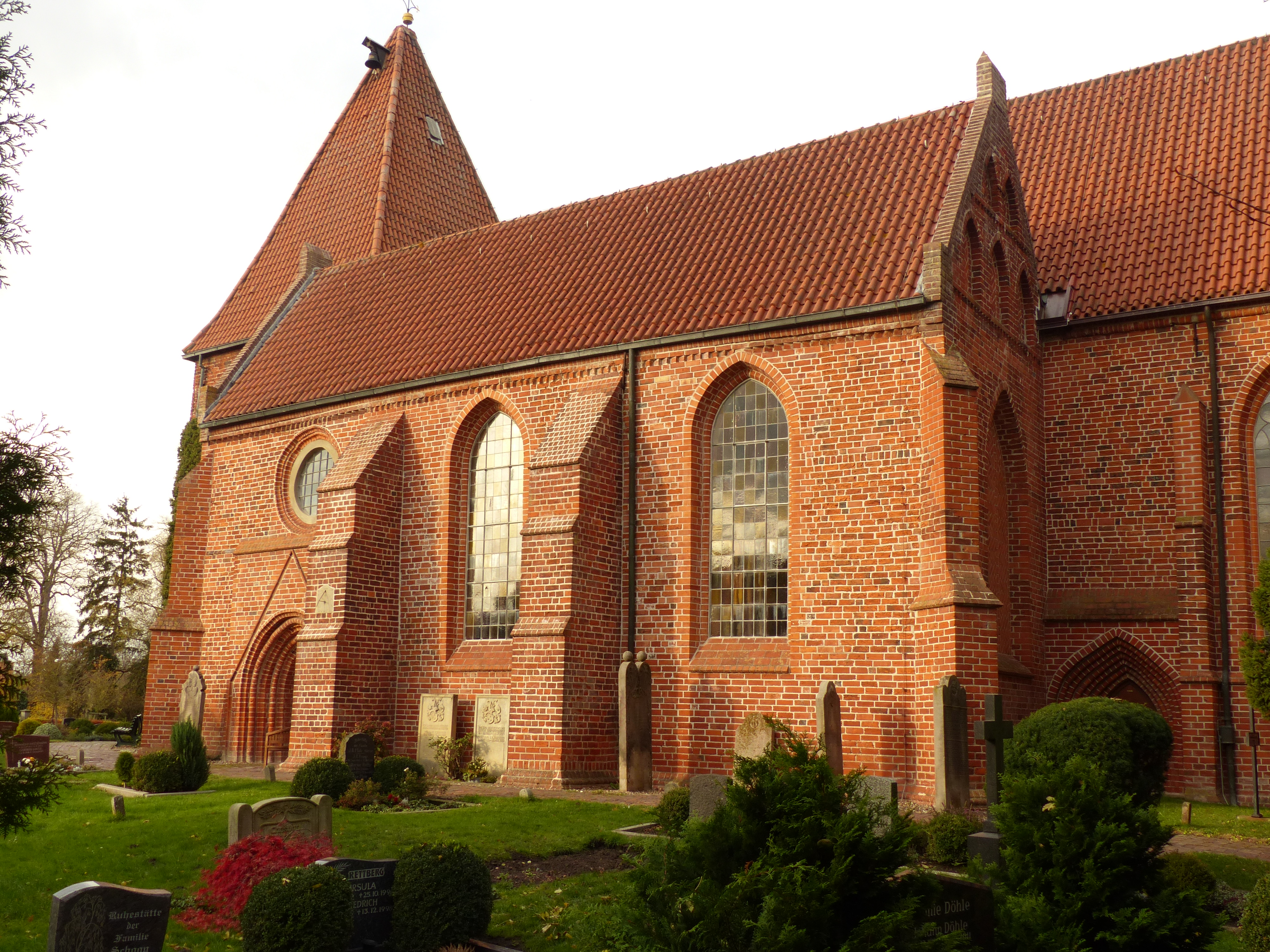 Südliches Seitenschiff der Heiligkreuzkirche in Bardewisch von SSO